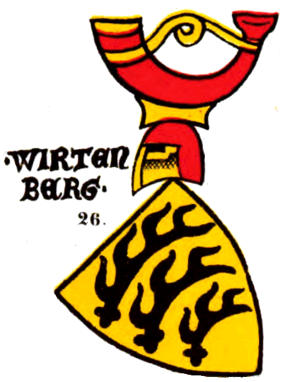 Wappen der "Wirtenberg"